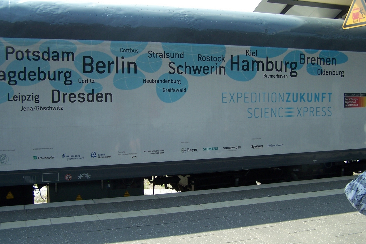 Der Science Express auf dem Erfurter Hauptbahnhof.